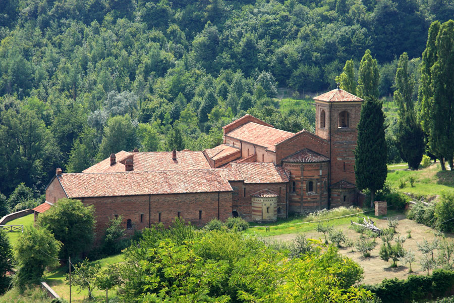 Abbazia di Vezzolano presso Albugnano (AT)